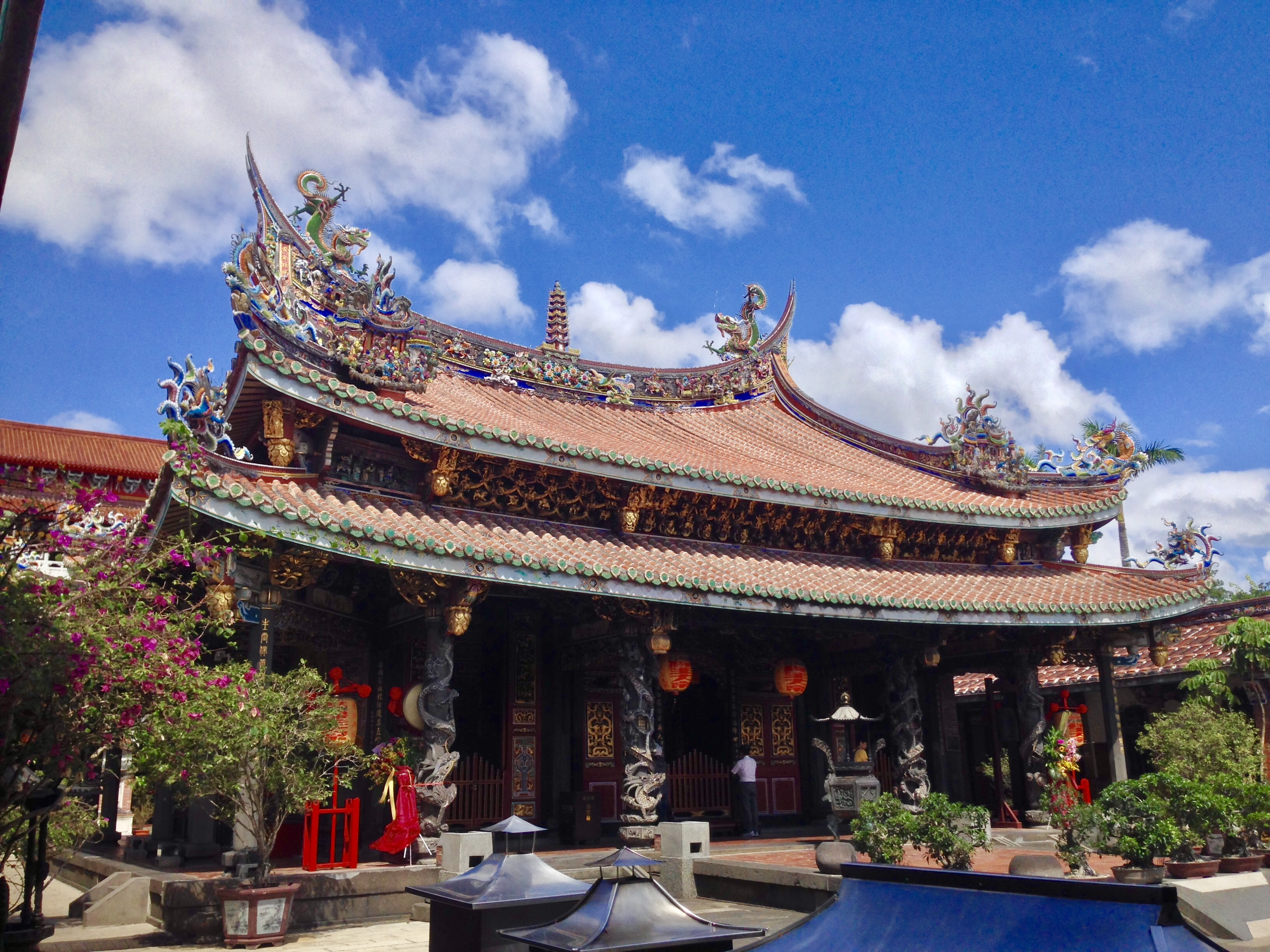 中文（台灣）: 大龍峒保安宮正殿斜照